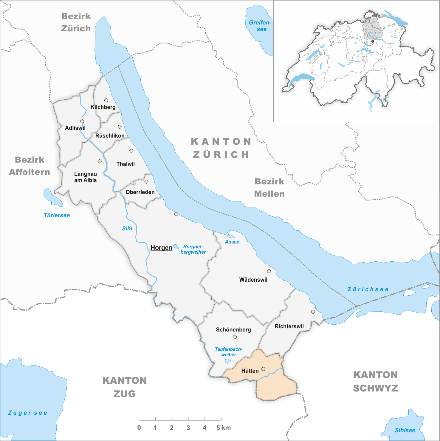 Municipality Illnau-Effretikon